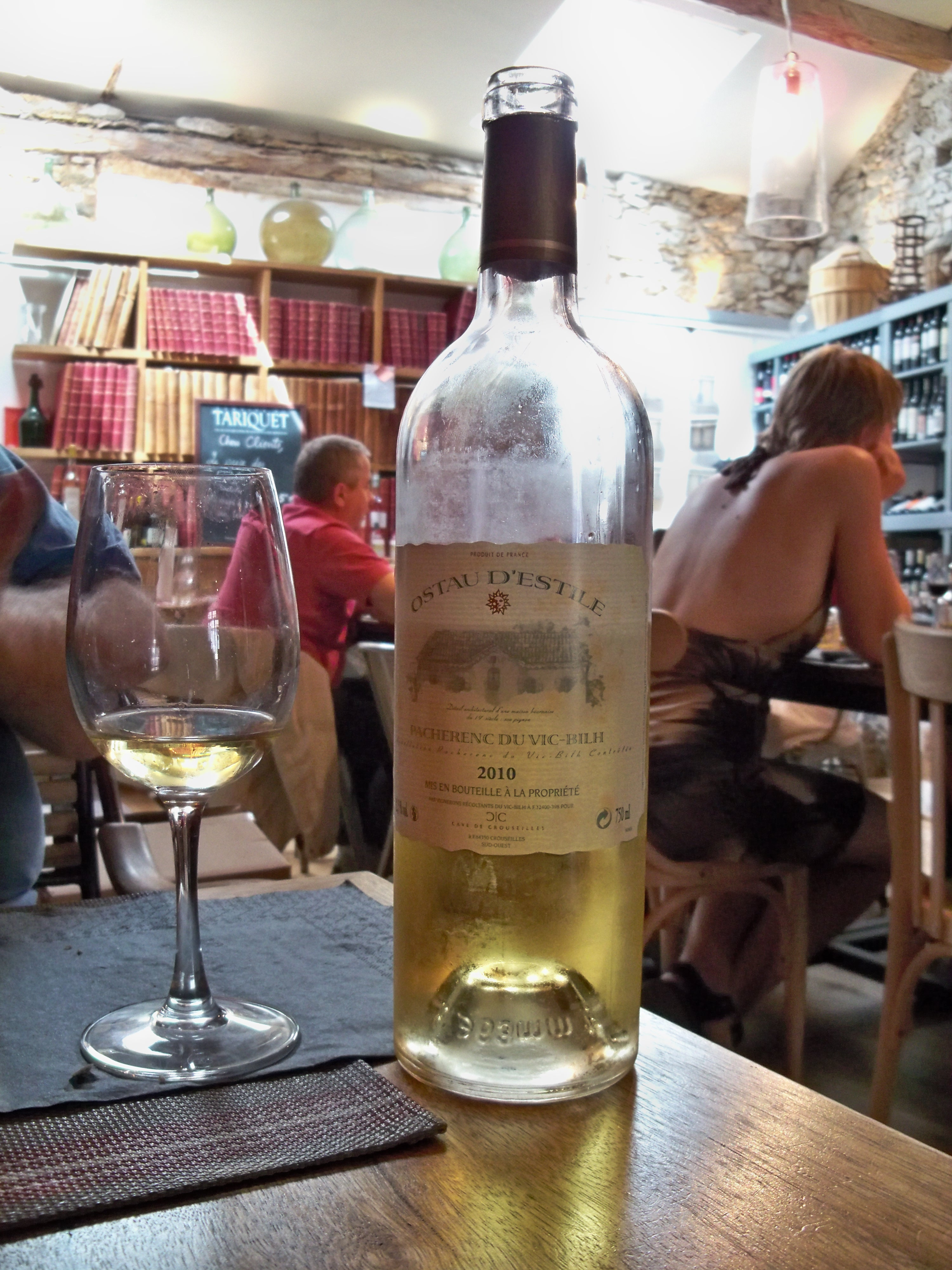 bouteille de Pacherench du vic-bilh